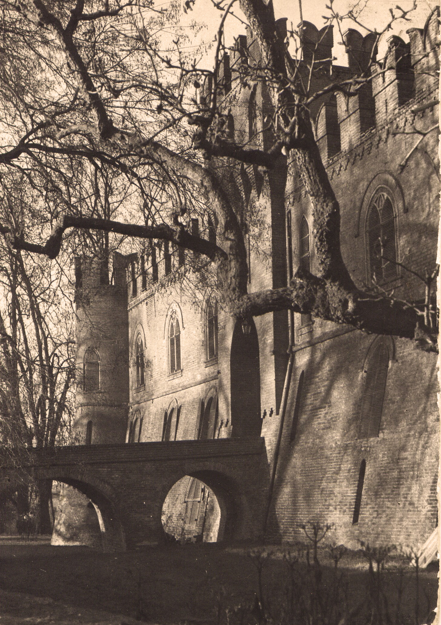 (Informazioni file